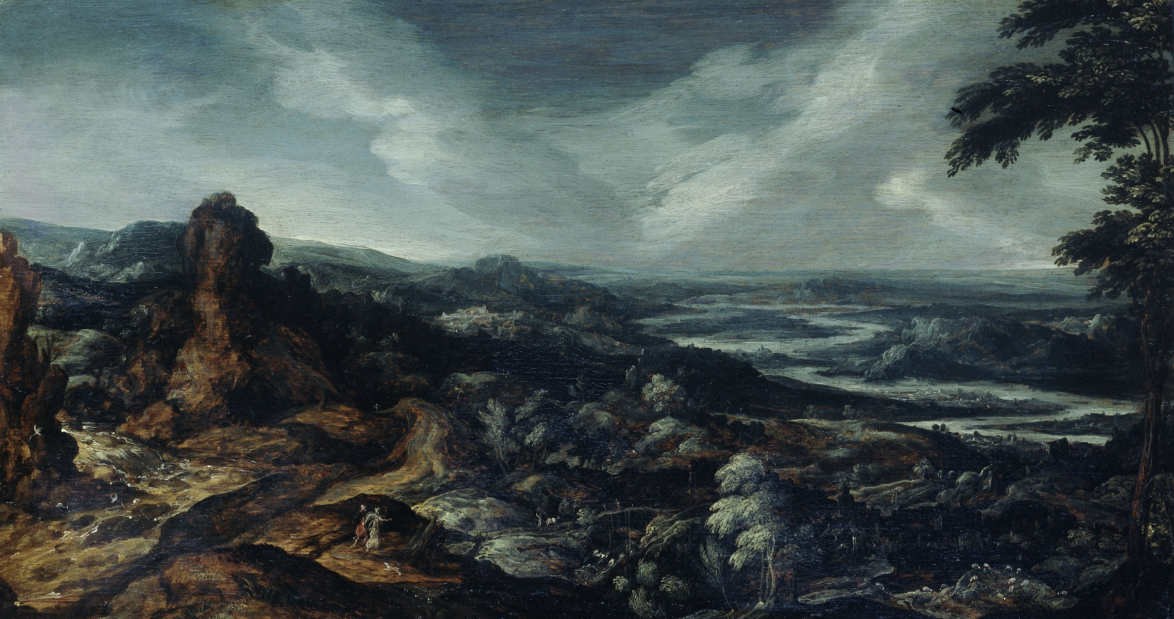 Panoramisch heuvellandschap met Tobias en de Engel. Links een rivier met waterval tussen bergen, rechts een stad in een dal met in de verte een kronkelende rivier.